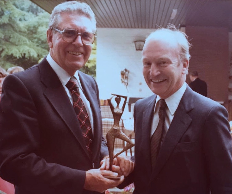 Geschenkübergabe durch Hermann Bahlsen an Heinz Flessner anlässlich seines 75 Geburtstags.